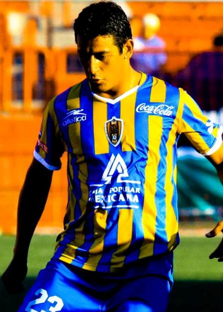 Copa Tijuana 2011 disputada en el estadio caliente de Tijuana entre Monterrey, Xolos, San Luis y Puebla. Mas información fotos y videos en